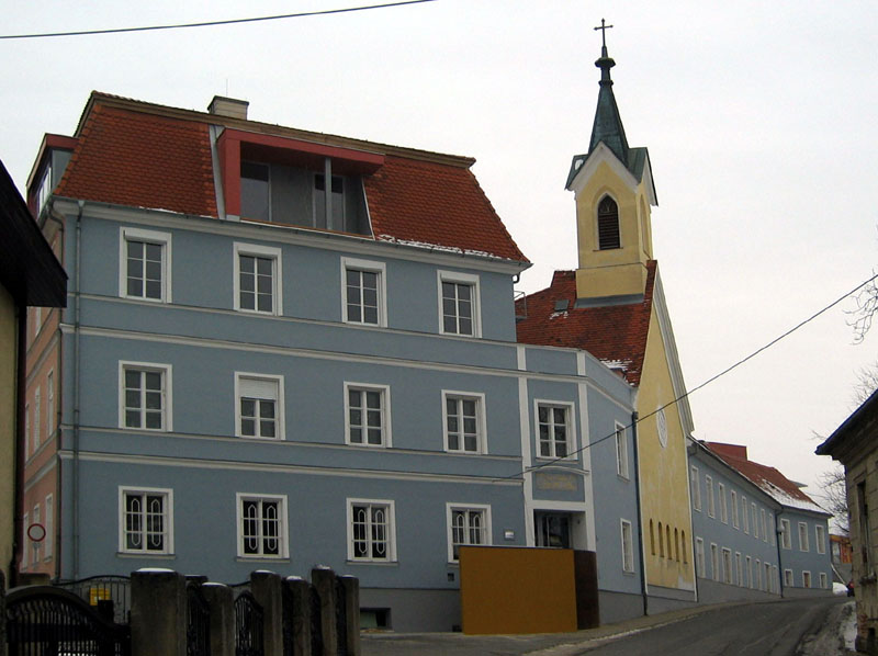 Monastery in Pinkafeld, Burgenland, Austria